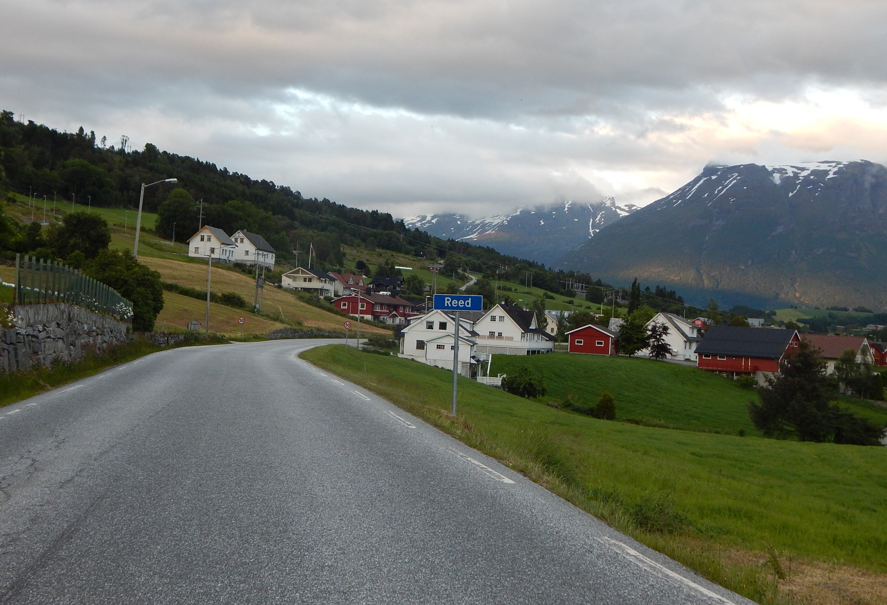 E39 gjennom Reed i Gloppen